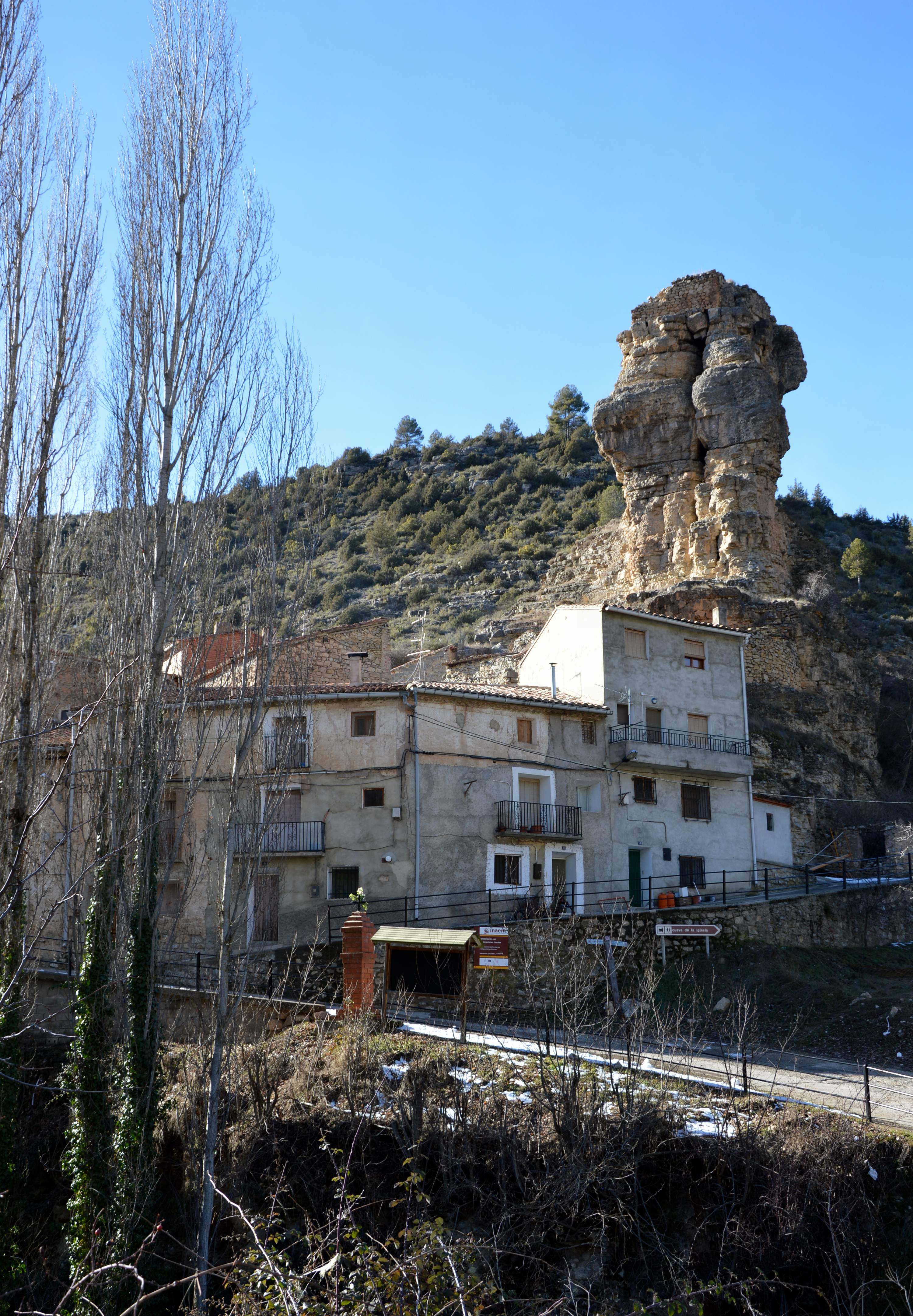 Entrada septentrional a Tormón (Teruel), con detalle del tormo del Castillo, desde la fuente del Lavadero (2017).